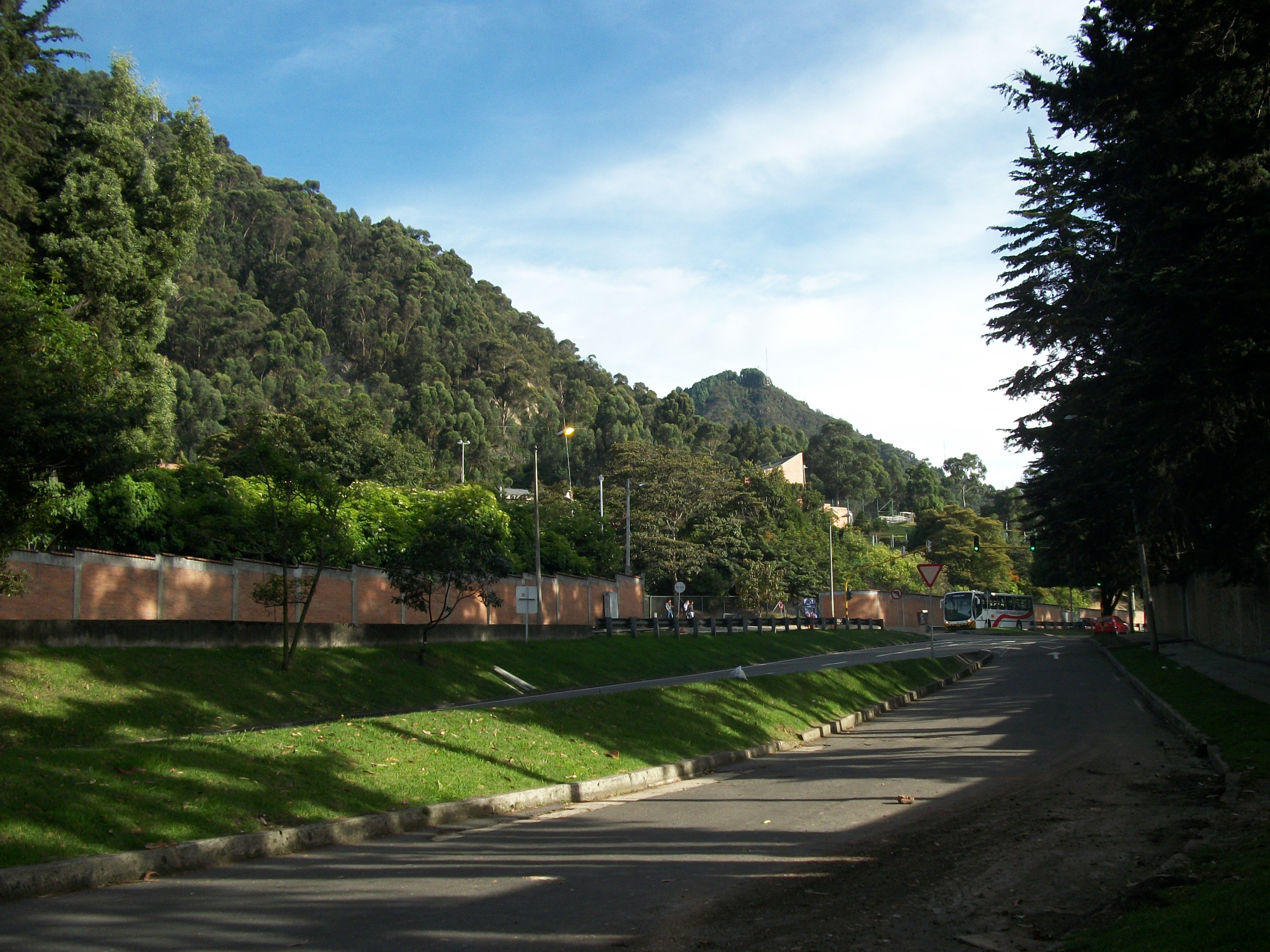 Avenida Circunvalar a la altura del colegio Bueva Granada.